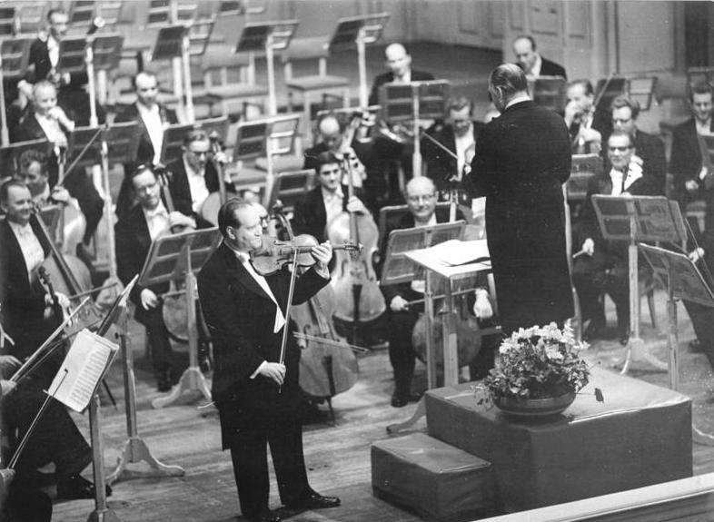 Zentralbild-Hochneder-Eckleben Eckl-Noe 15.10.1960 Berliner Festtage 1960 Festkonzert mit David Oistrach in der Deutschen Staatsoper Zum größten künstlerischen Ereignis während der Berliner Festtage wurde am 14.10.1960 das Auftreten des weltbekannten sowjetischen Geigers David Oistrach in der Deutschen Staatsoper zu Berlin. Der Meister interpretierte unterstützt von der Staatskapelle unter Franz Konwitschny Beethovens Violinkonzert. Das Publikum dankte mit minutenlangem Beifall. UBz: David Oistirach während des Konzerts.